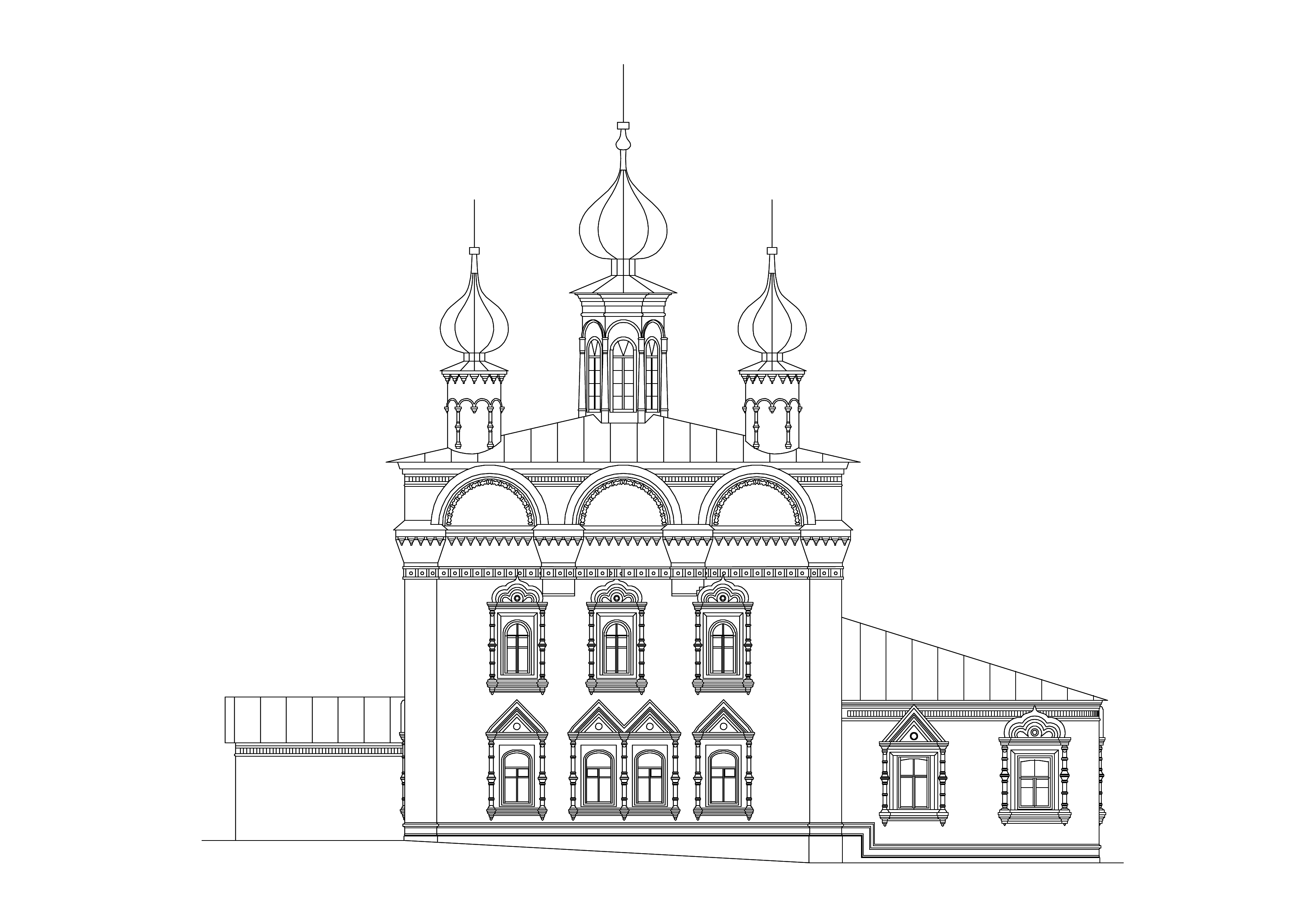 Спасская церковь. Чертёж. Город Соликамск